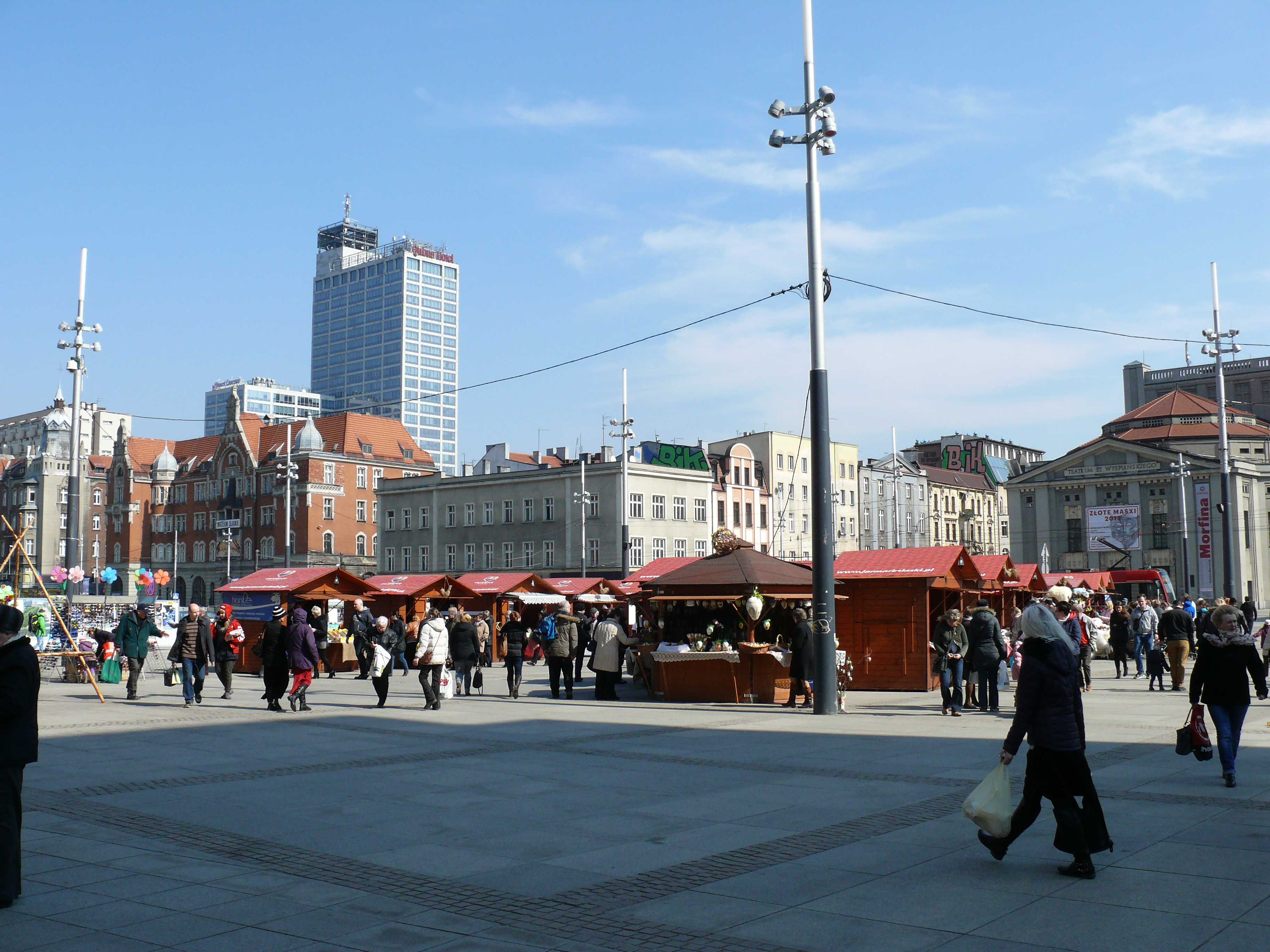 Blick auf den Nordostteil des Rynek in Kattowitz, mit dem Schlesischen Theater rechts und dem Altus-Hochhaus links.